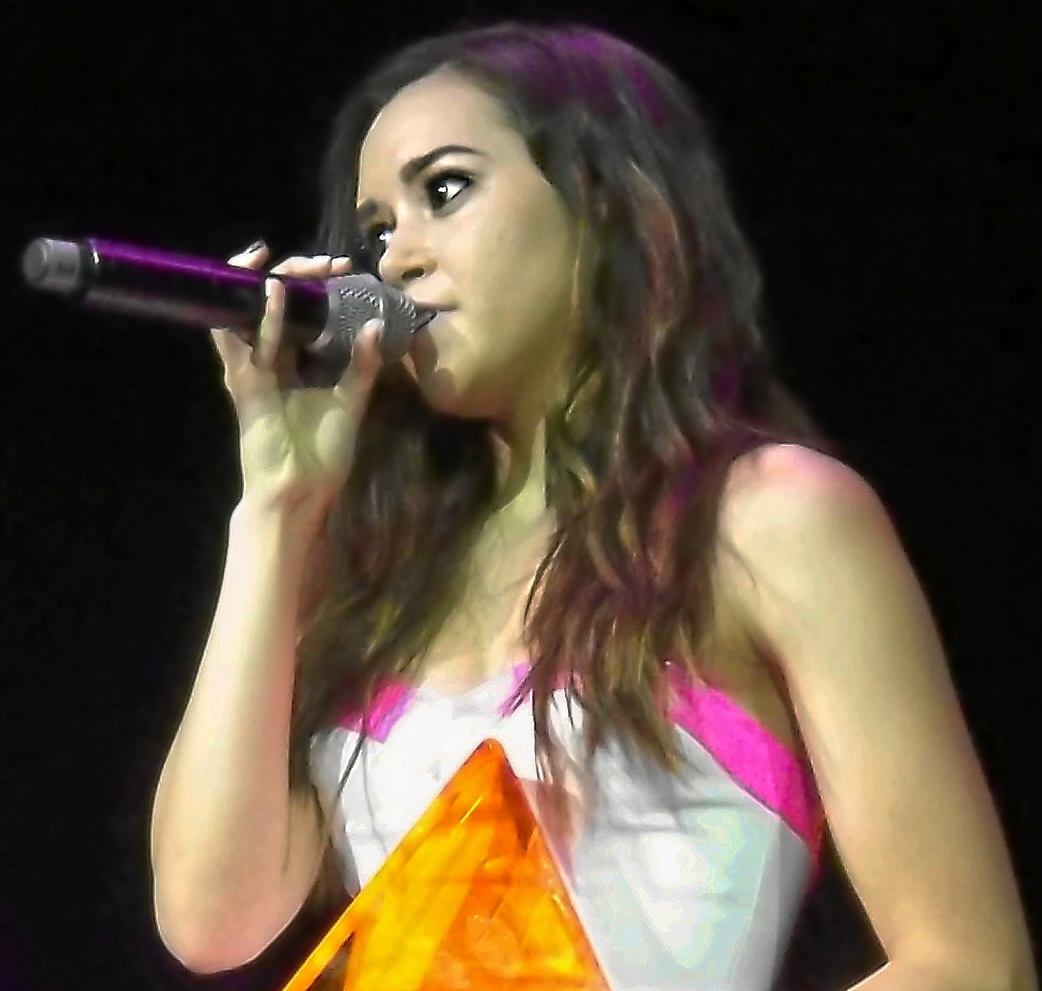 Megan nicole live 2014